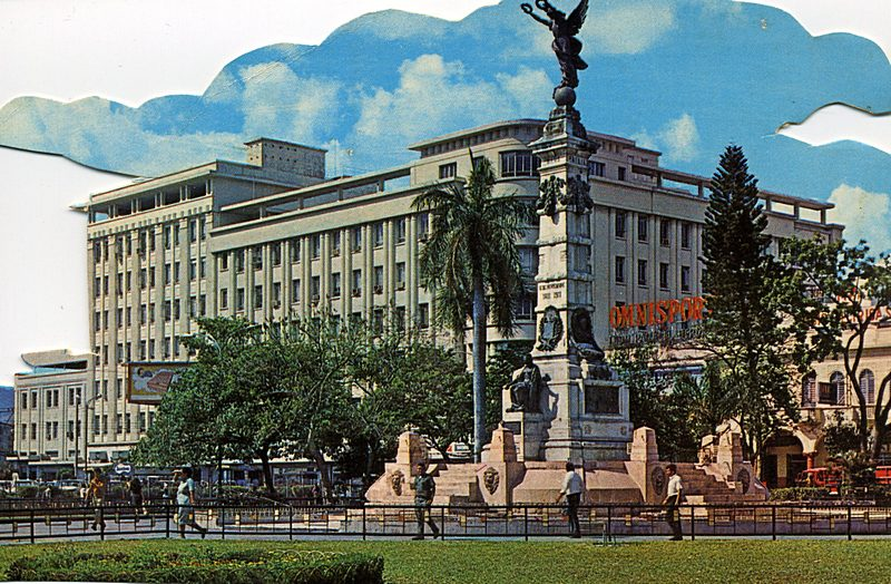 Plaza Libertad y edificio Dueñas antes del terremoto de 1986